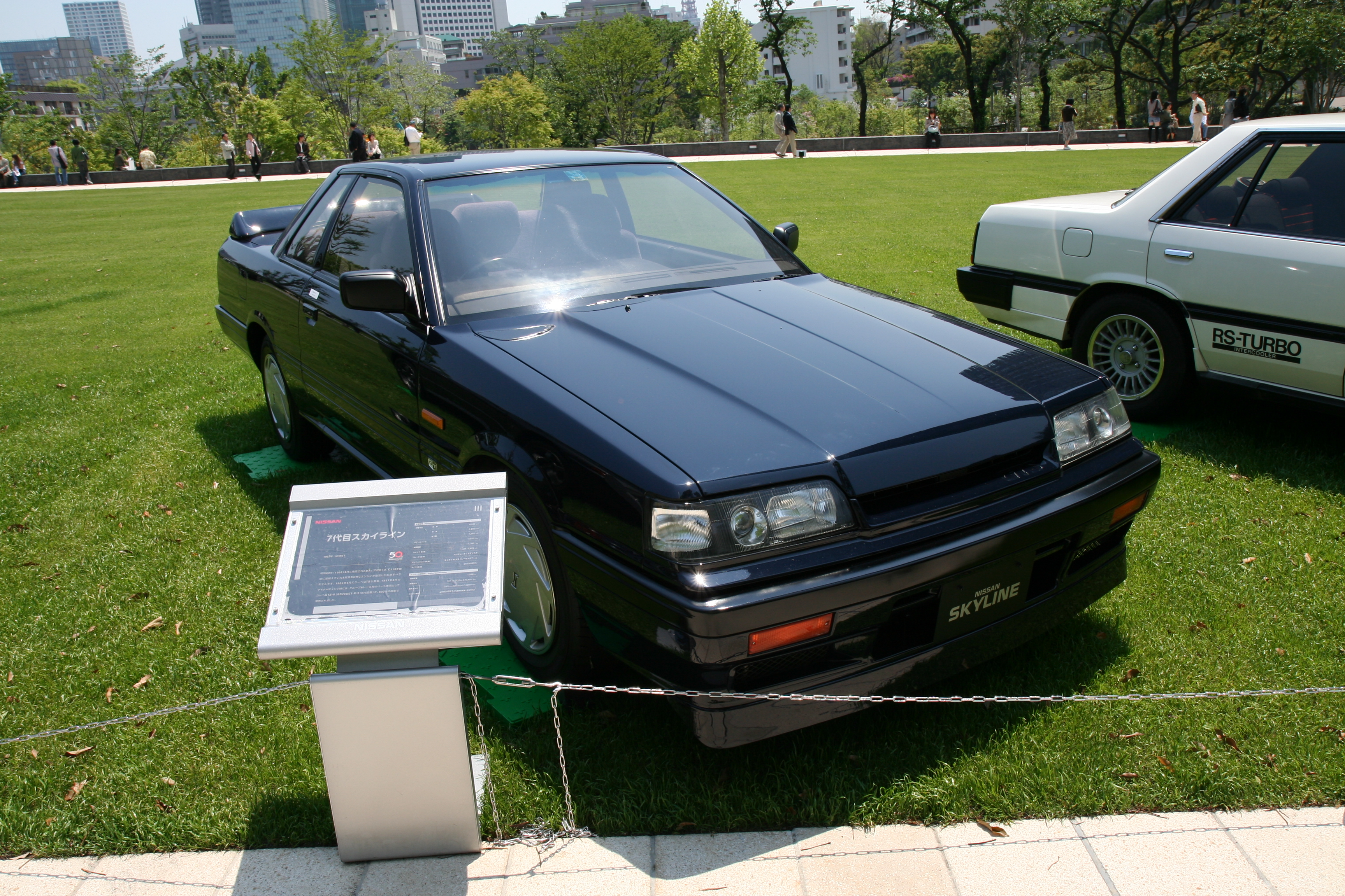 日産・スカイライン 7代目(R31系)。